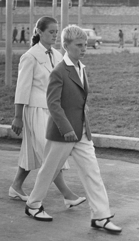 Mircea Roger